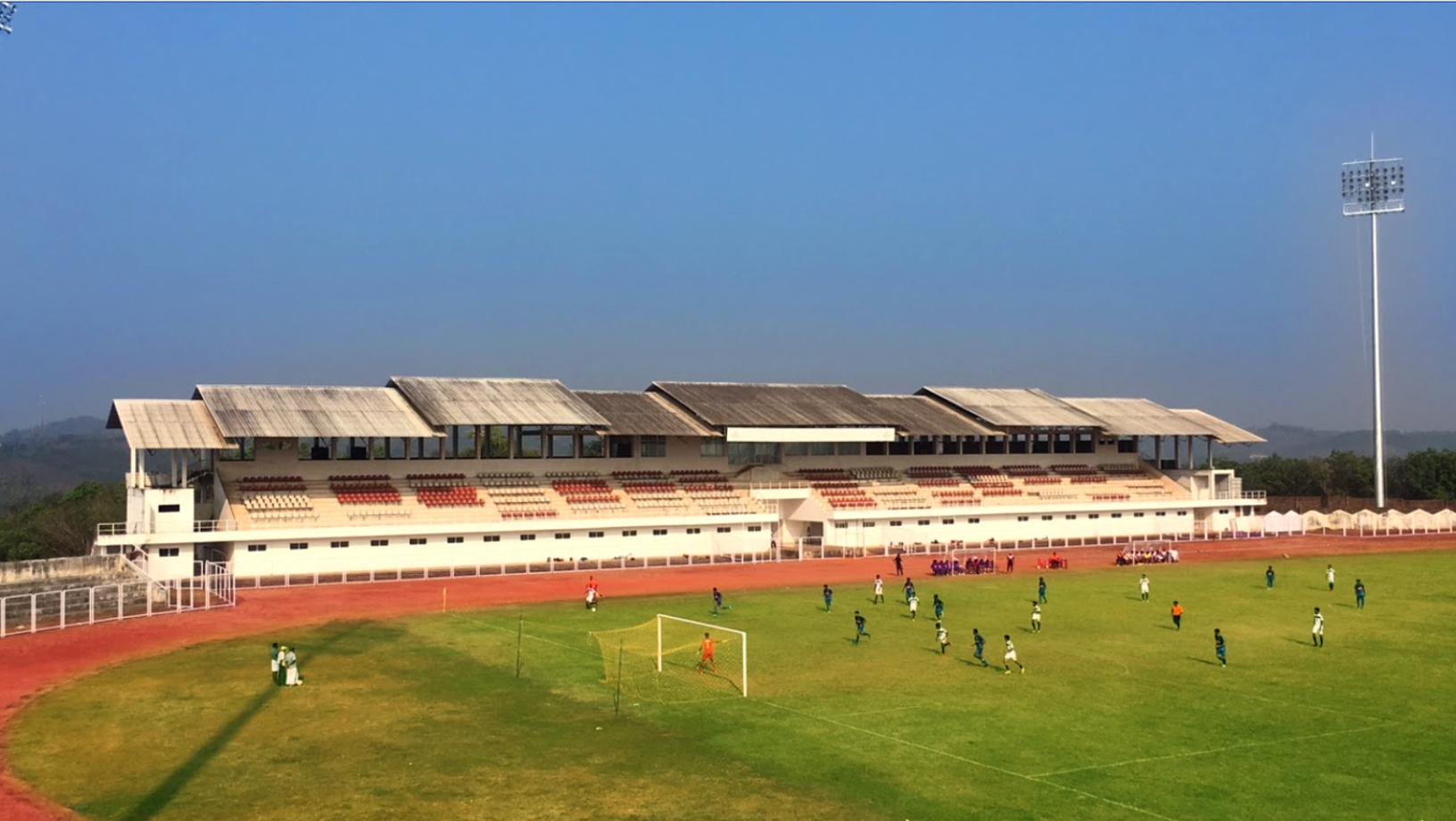 മഞ്ചേരി സ്റ്റേഡിയം കോംപ്ലക്സ്